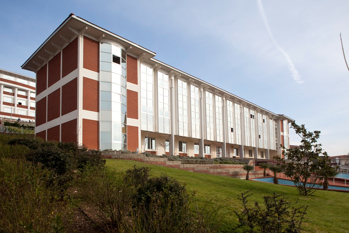 Işık Üniversitesi Şile Kampüsü